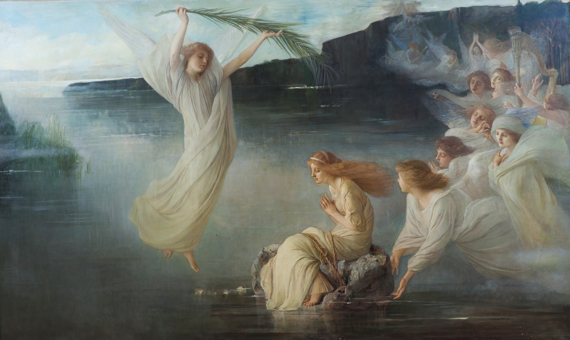 La obra representa el martirio de Santa Cristina de Bolsena, que fue atada por su padre a una rueda de molino y sumergida en un lago, aunque por intervención divina, la piedra quedó a flote. Pero al final fue asesinada por una flecha disparada por el prefecto Giuliano.